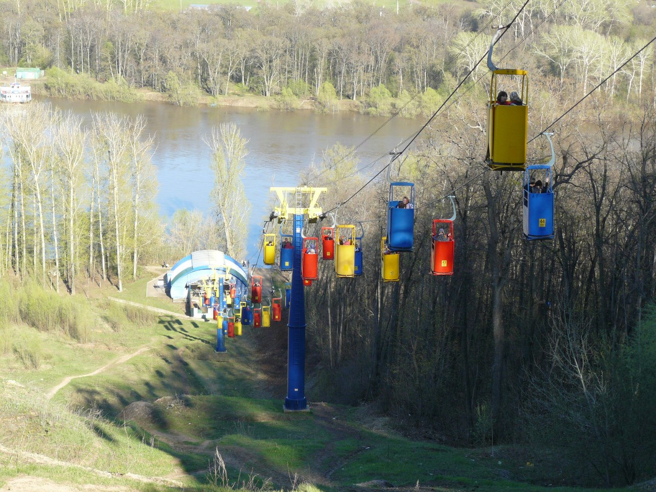 Уфимская канатная дорога